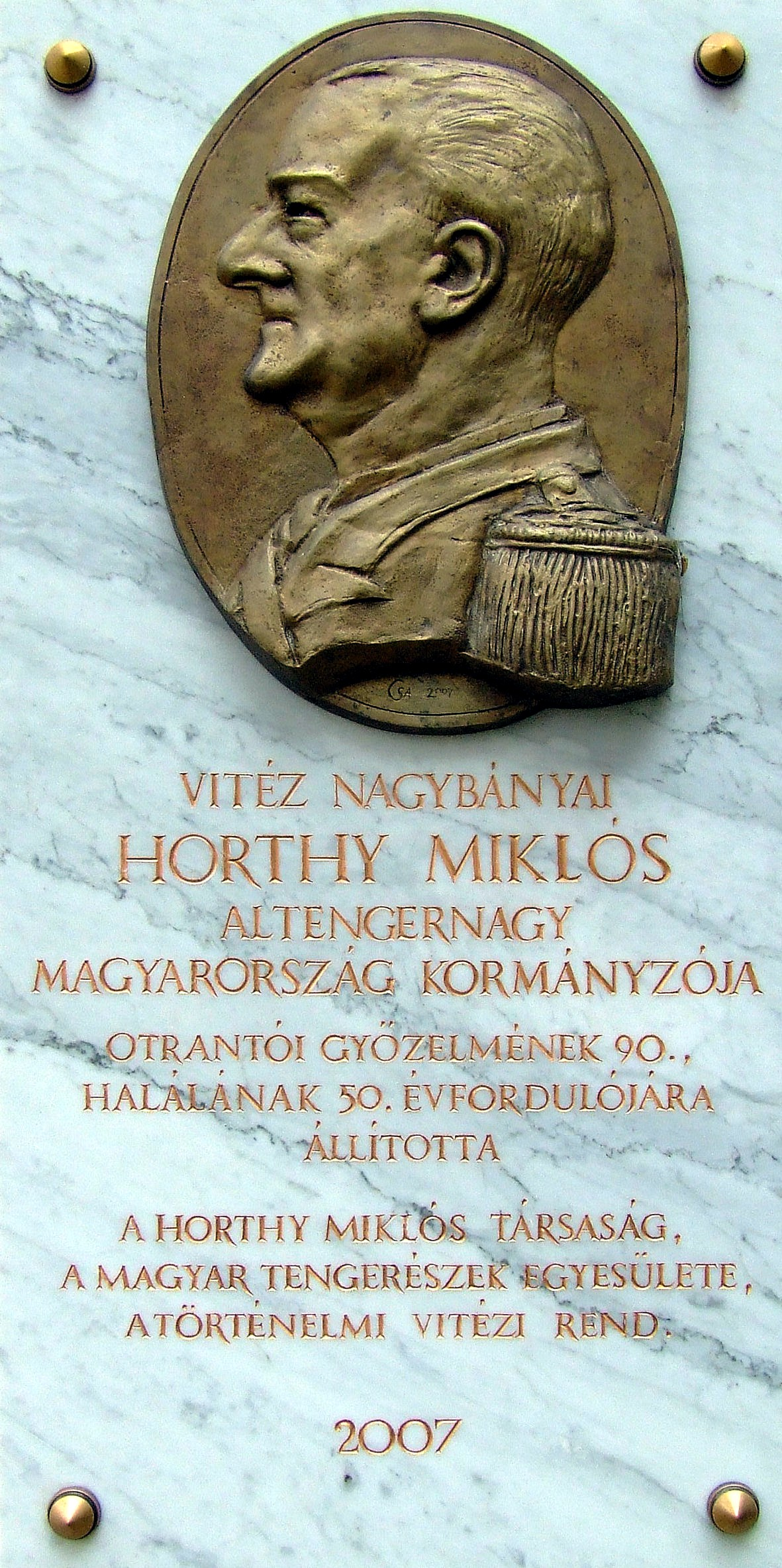 Horthy Miklós otrantói győzelme és halálának 50. évfordulója alkalmából állított emléktábla a budapesti Hadtörténeti Intézet és Múzeum udvarán. Csák Attila szobrászművész alkotása